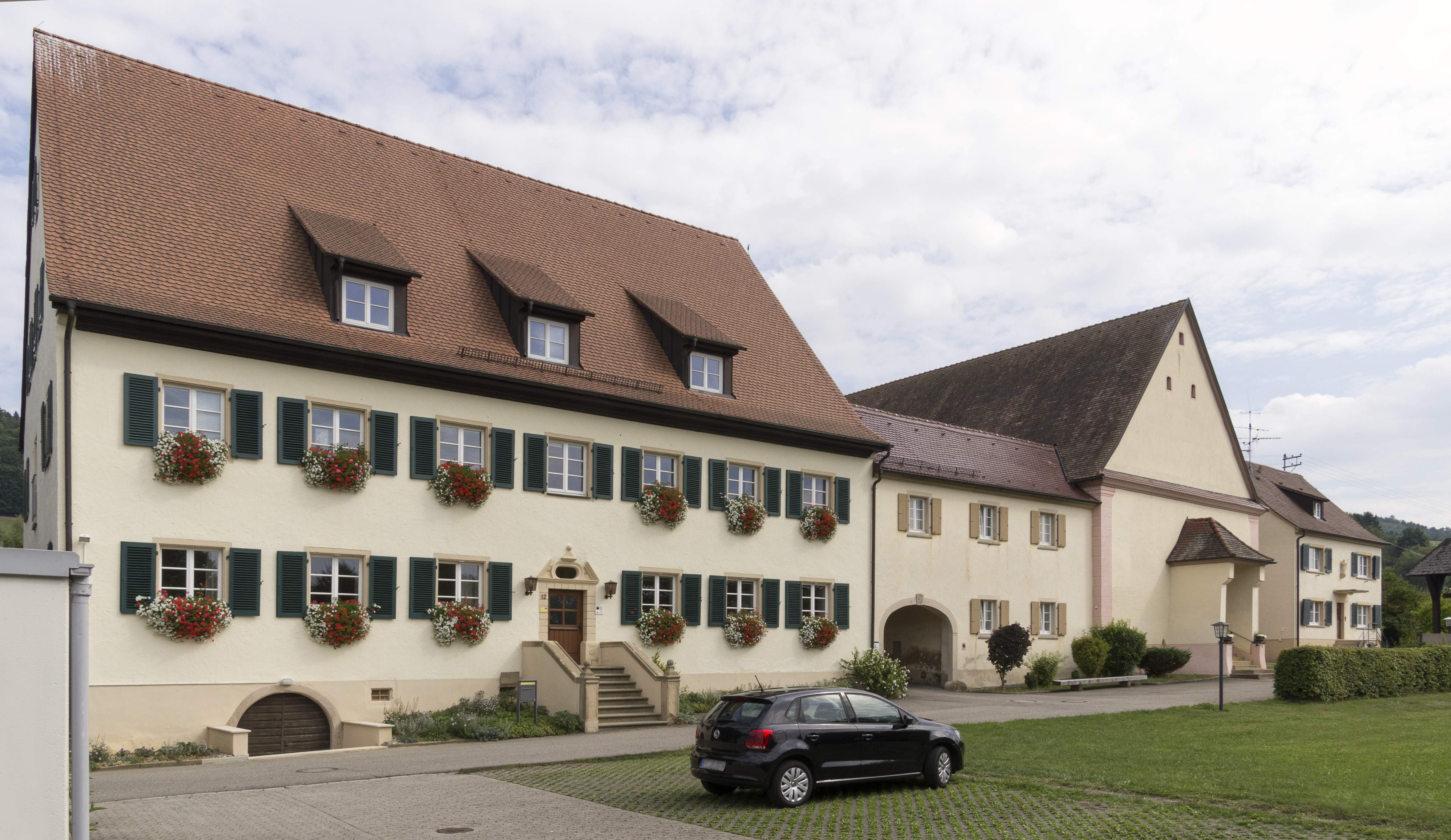 Katholische Pfarrkirche in Sölden bei Freiburg